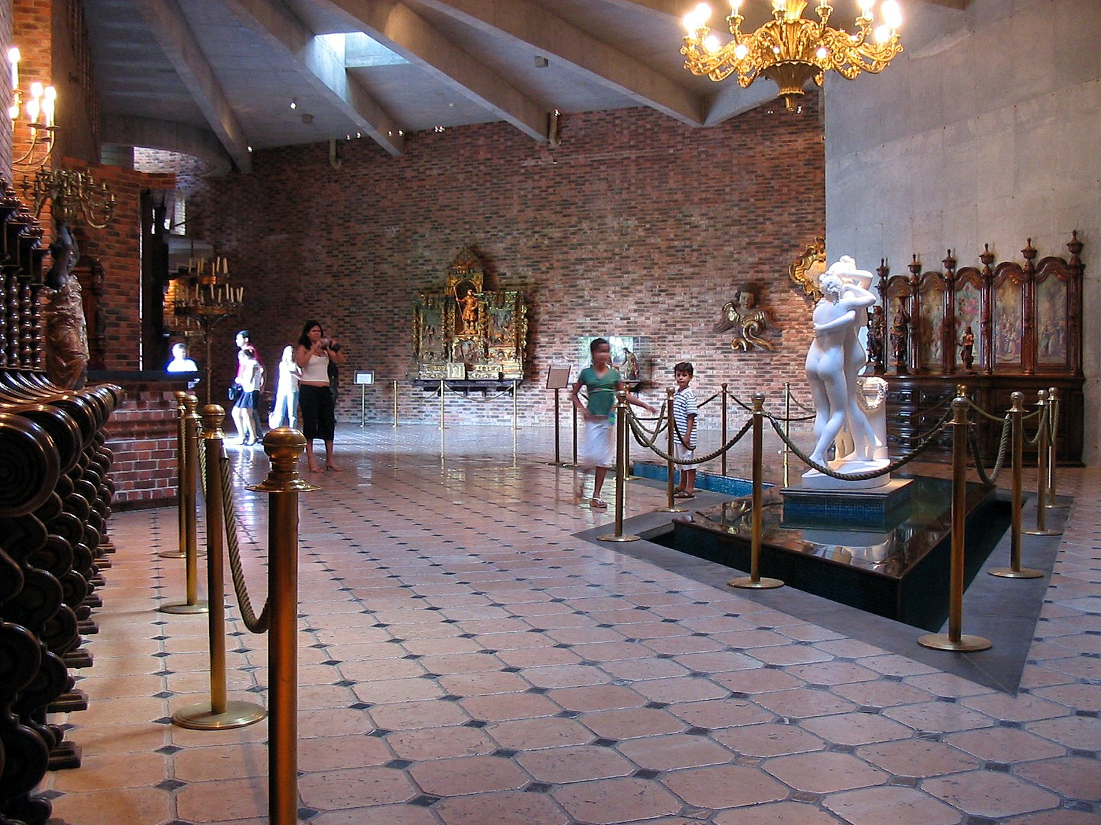 Hall de entrada da Pinacoteca do IRB de Recife.